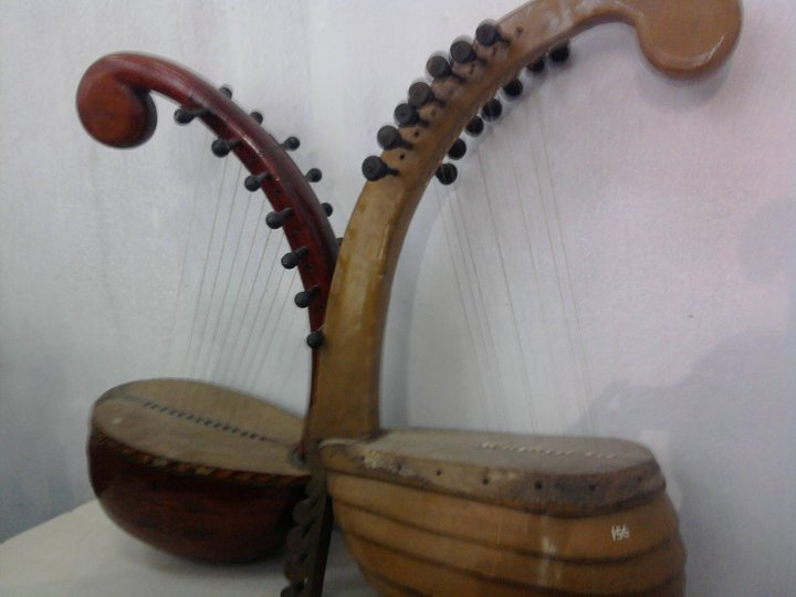 சங்க கால பண்டைய தமிழரின் இசைக்கருவி யாழ் . (Ancient musical instrument of the Tamil people) Two yazh in a display case.